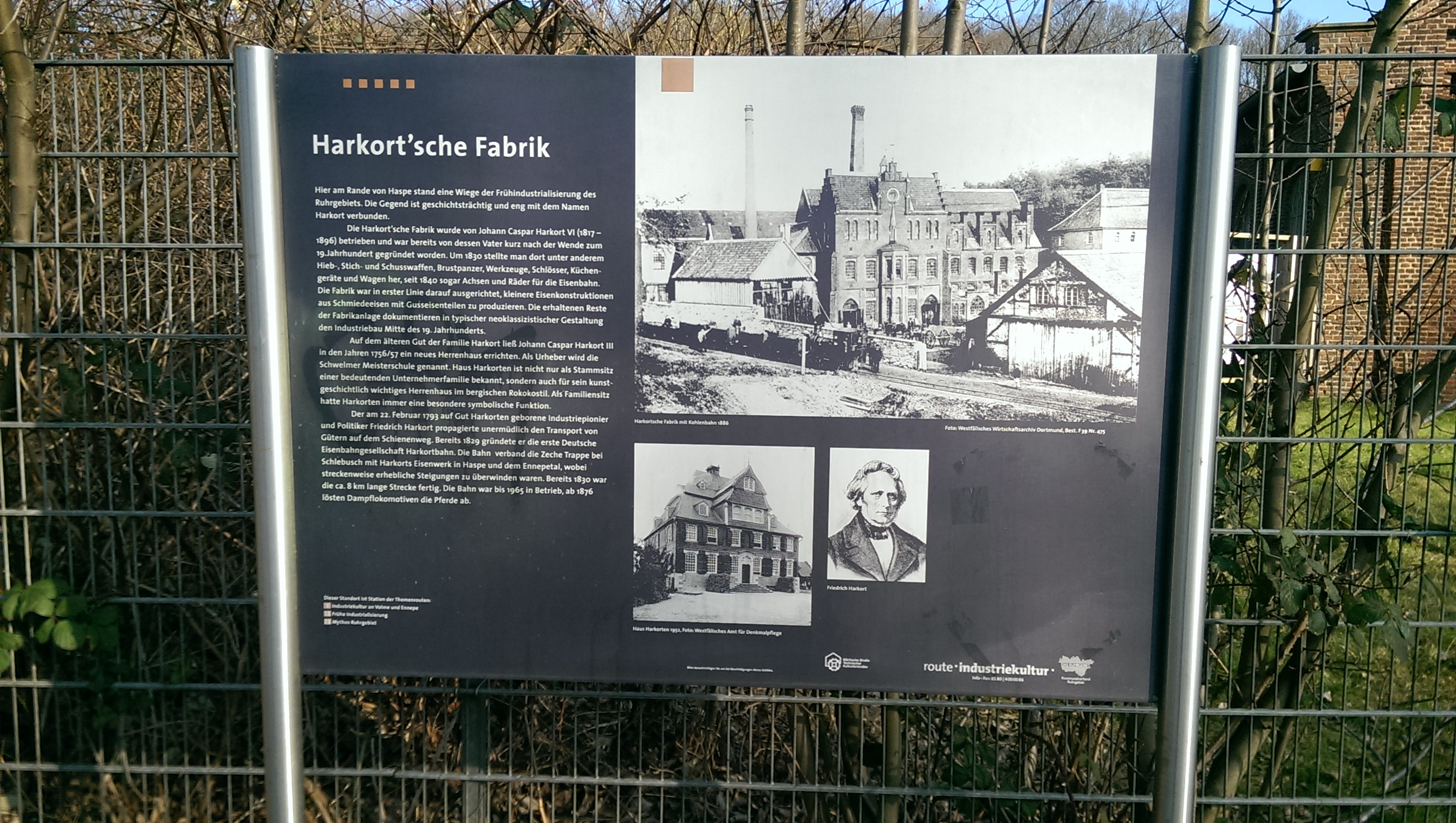 Schild an der Harkort’schen Fabrik